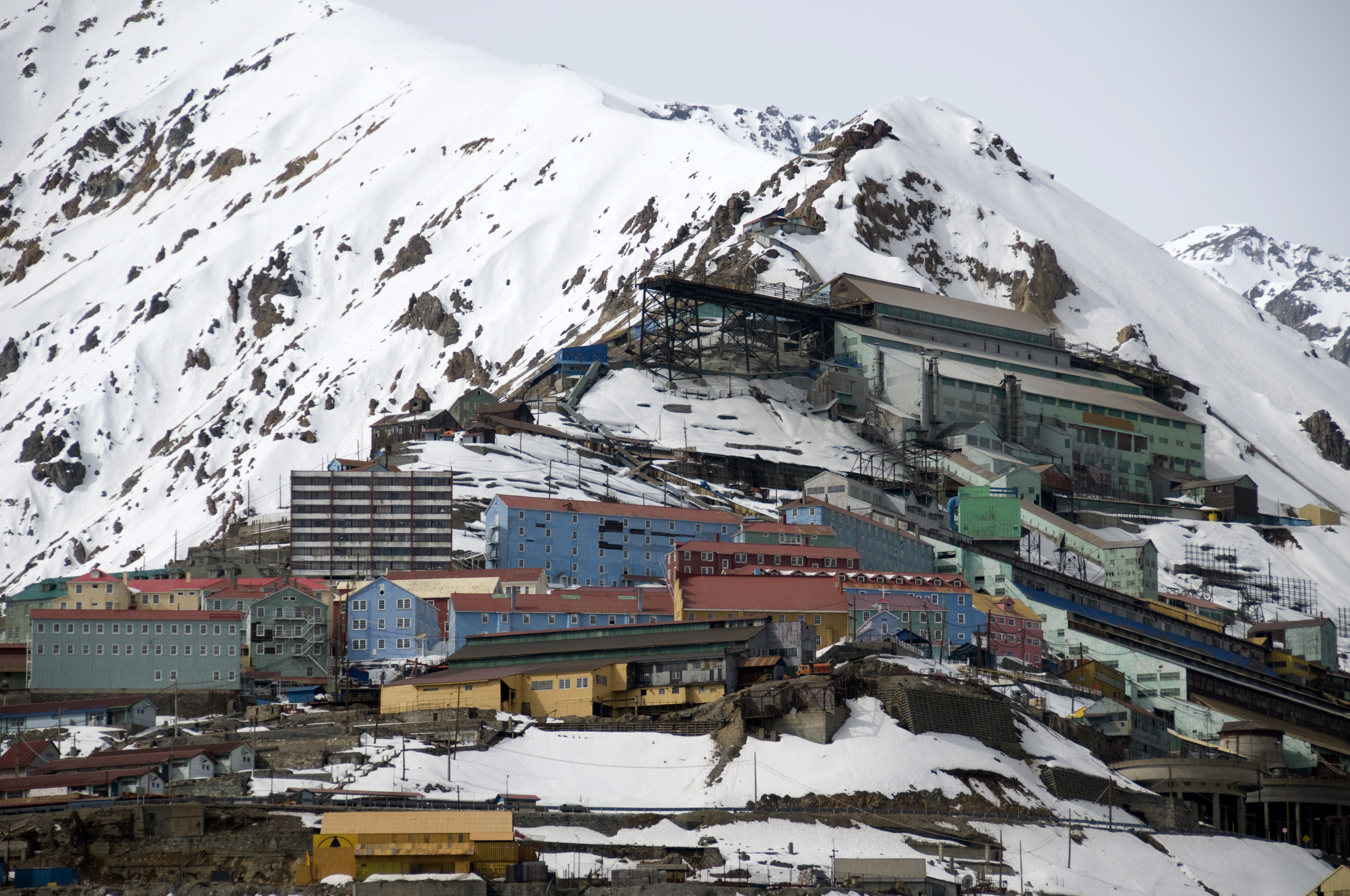 Sewell fue una ciudad minera ubicada en la comuna de Machalí, Chile. Se encuentra a 150 km al sur de Santiago y a 64 km de la ciudad de Rancagua. Fue declarada Patrimonio de la Humanidad por la UNESCO en el año 2006, por su incalculable valor histórico y cultural para Chile y el mundo.